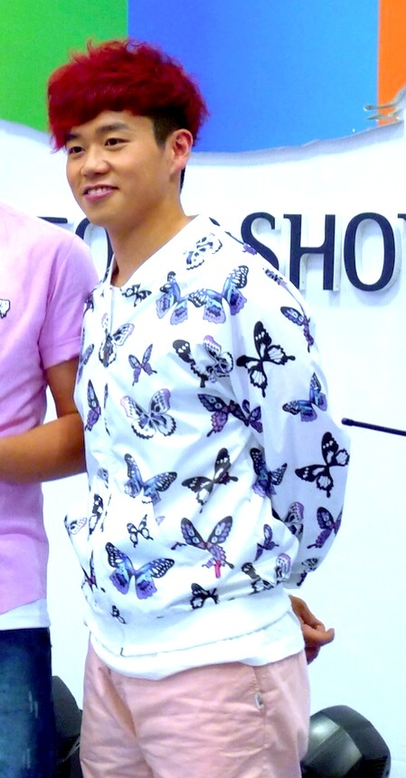 KFS 2013 김대성